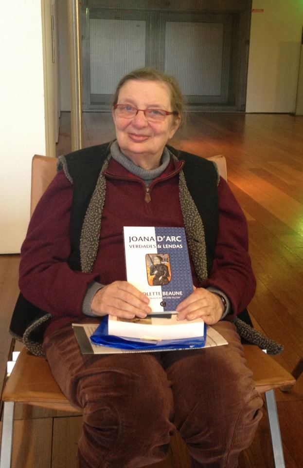 Colette Beaune avec l'édition en portugais (Brésil) de son livre "Jeanne d’Arc vérités et légendes" à la BNF en 2014.